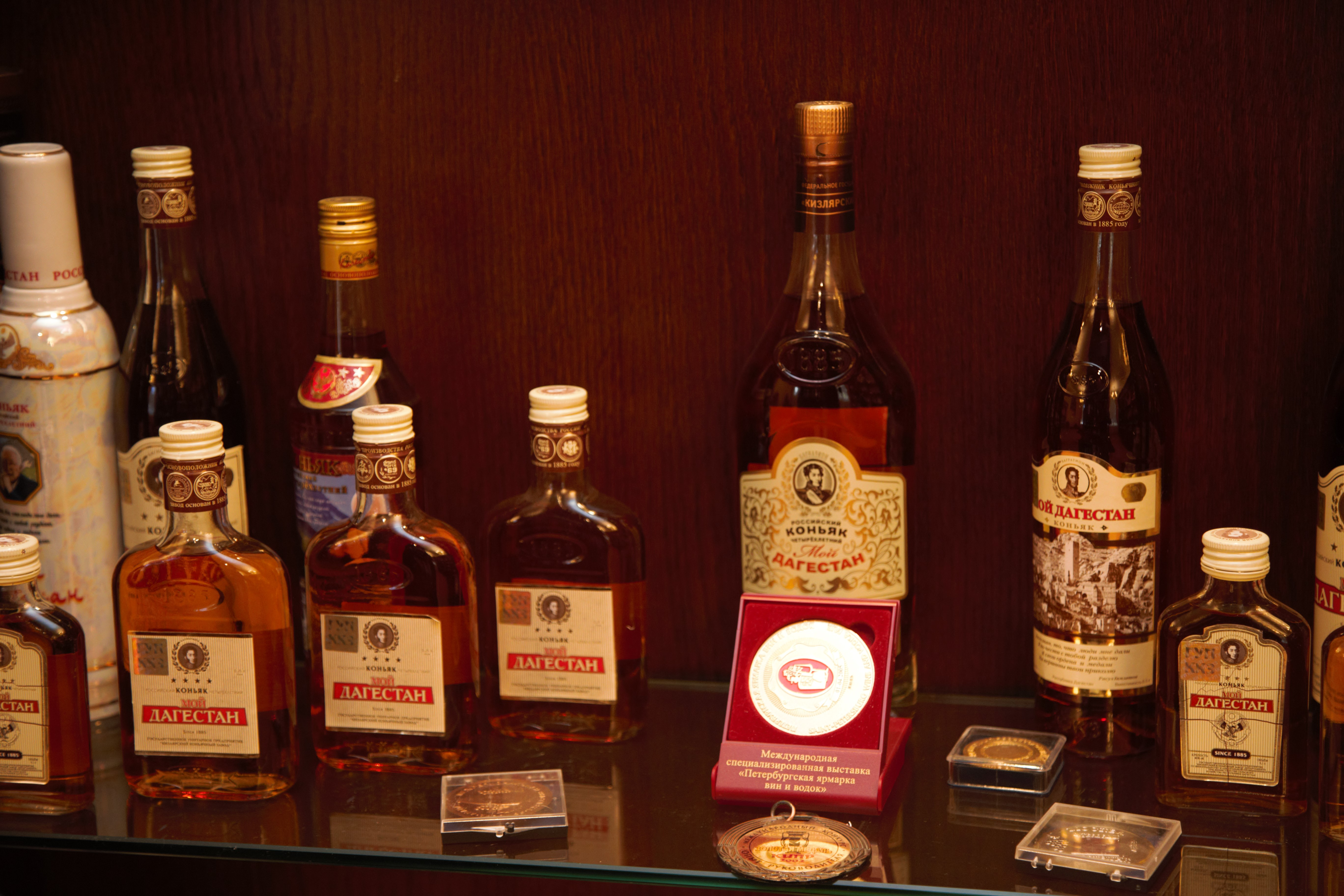 Коньяк Мой Дагестан